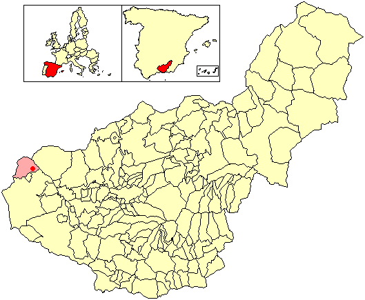 Situación de la localidad de La Viña (en el municipio de Algarinejo) respecto a la provincia de Granada, en España.